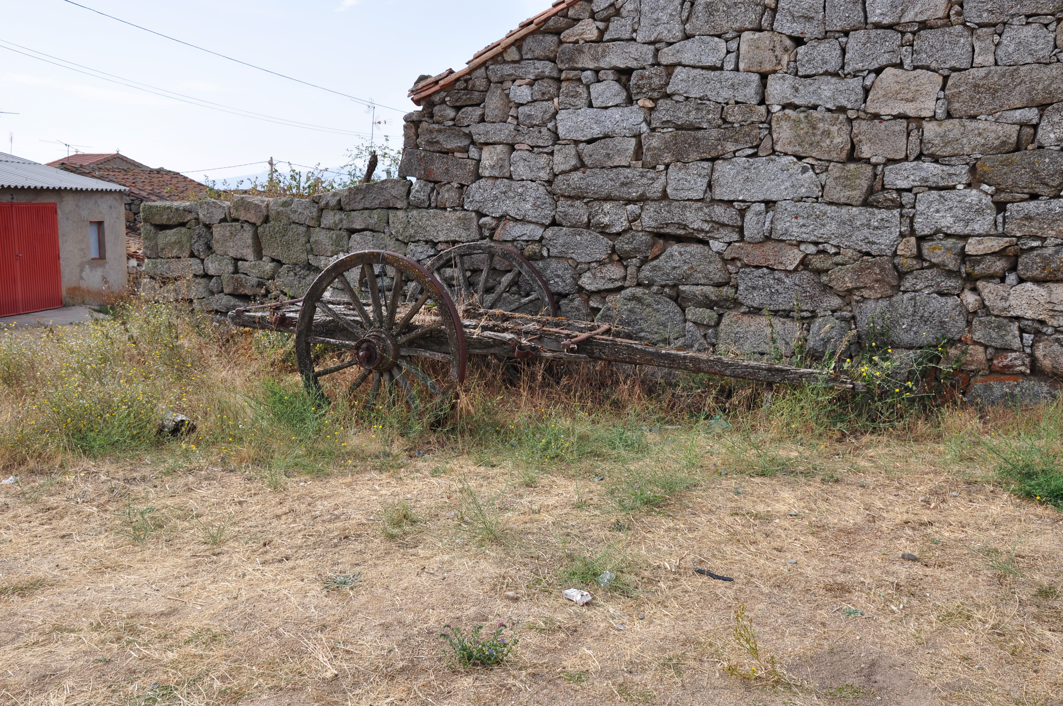 Carro en Sanchicorto (La Torre-Ávila), España.